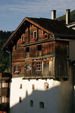 Walserhaus in Splügen